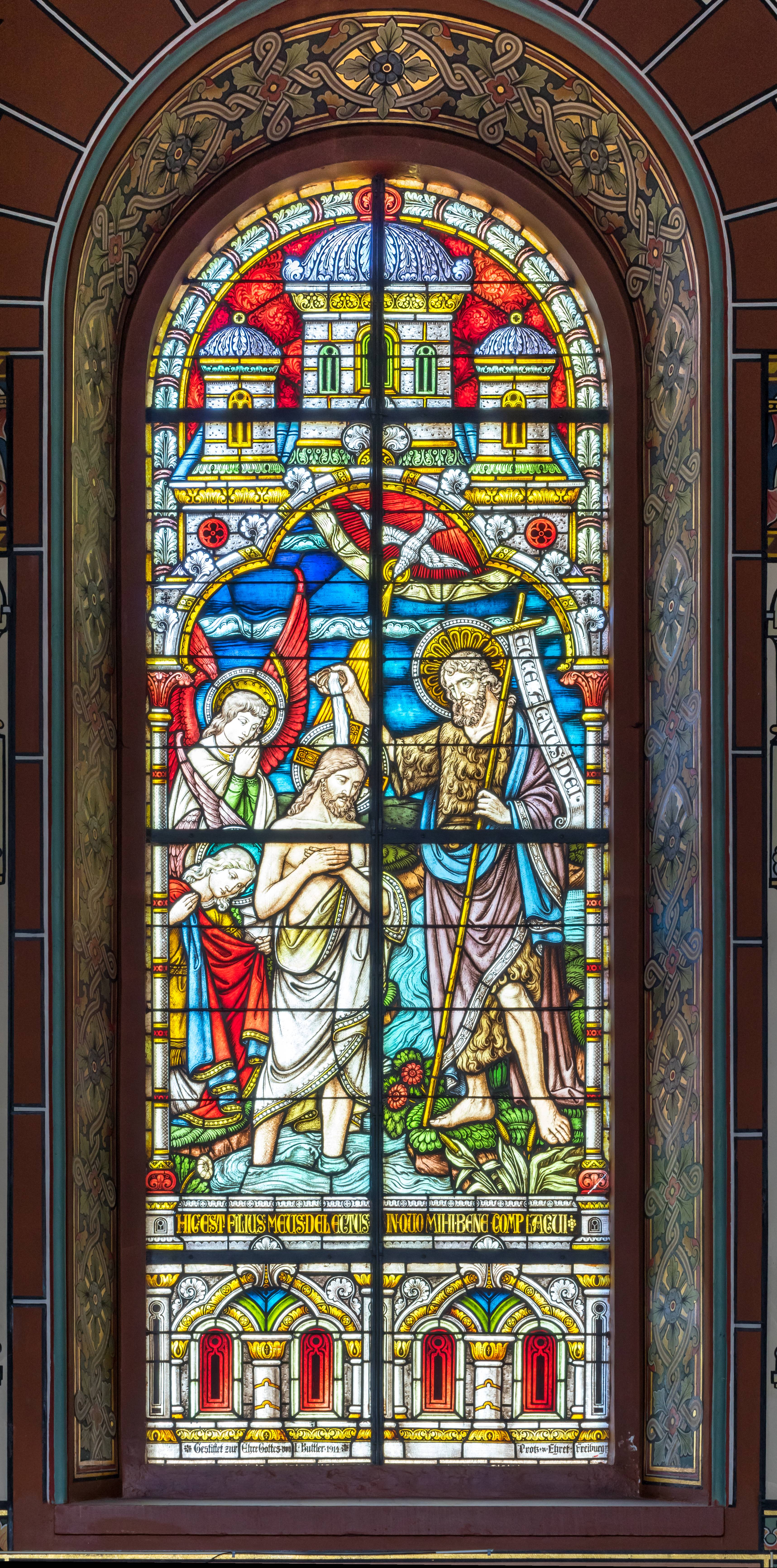 Glasfenster im Langhaus in der Kirche St. Peter und Paul in Bonndorf Inschrift HIC EST FILIUS MEUS DELECTUS IN QUO MIHI BENE COMPLACUI GESTIFTET ZUR EHRE GOTTES VON I. BUTTLER 1914 Protz u. EHRET FREIBURG/BR